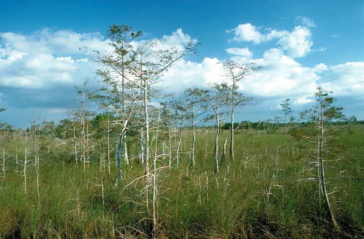 Graslandschaft mit dürren Bäumen im Everglades National Park National Park Service